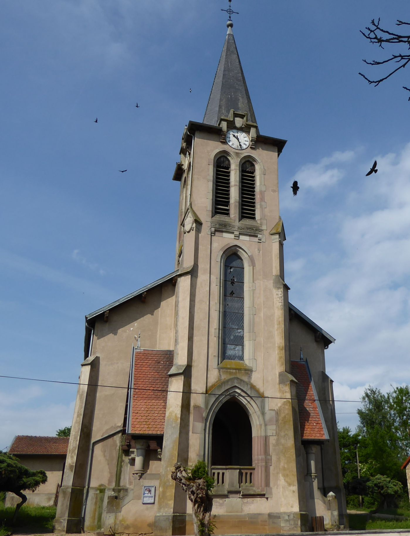 Église Saint-Martin de Brin-sur-Seille en Meurthe-et-Moselle (France).